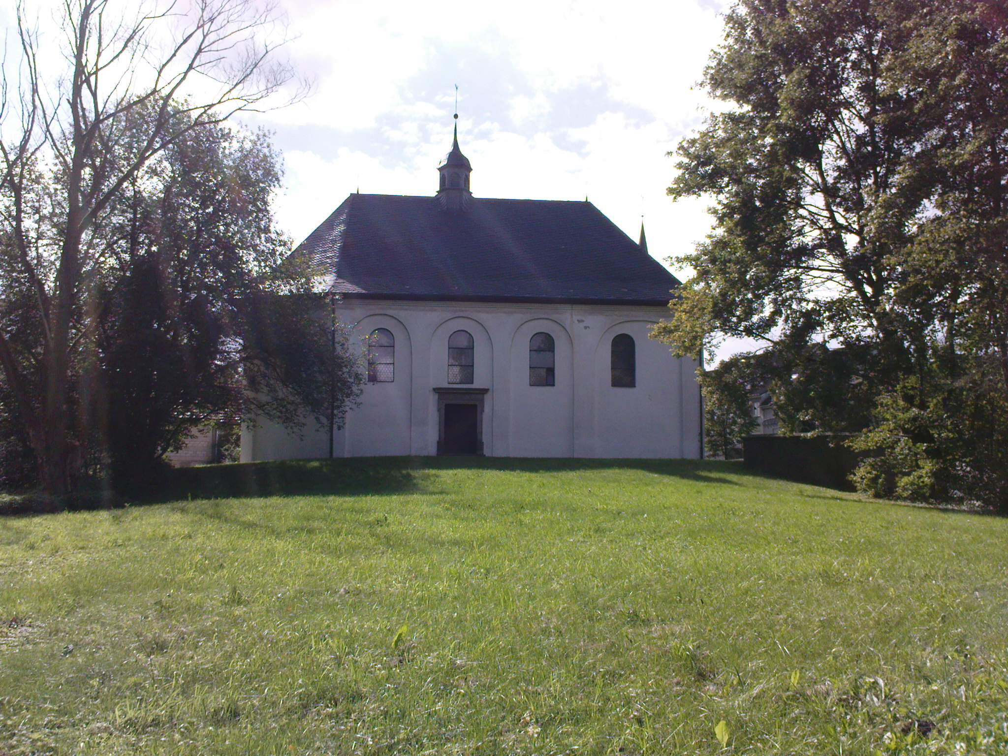 Annakapelle in Leverkusen-Lützenkirchen